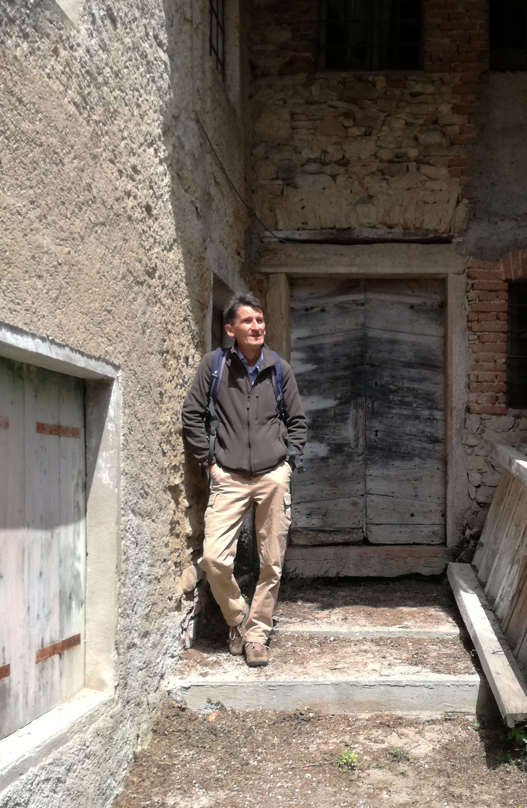 Foto di Liverio Carollo